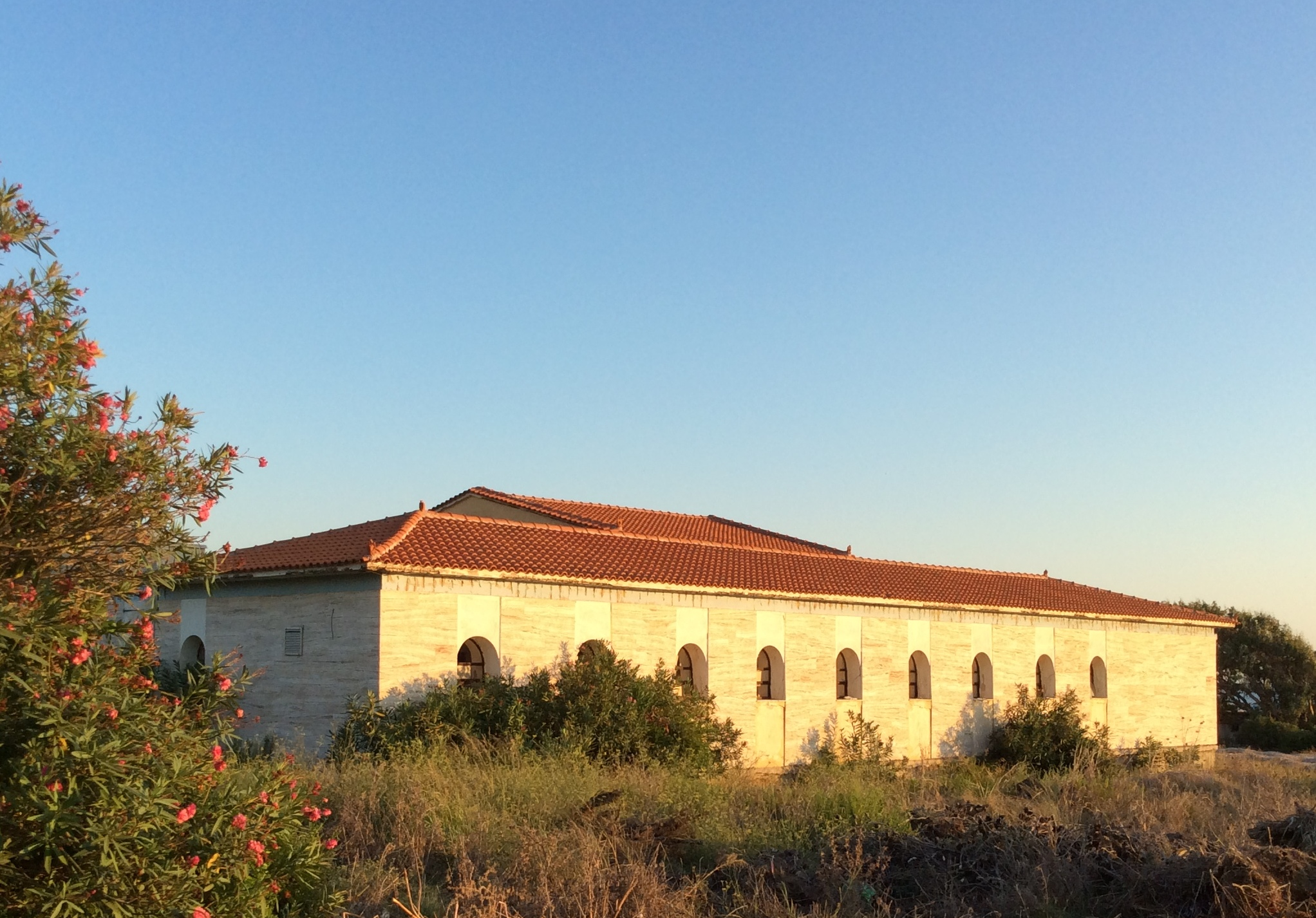 Βρομονέρι Μεσσηνίας. Παλαιές εγκαταστάσεις της ιαματικής πηγής του Βρωμονερίου.